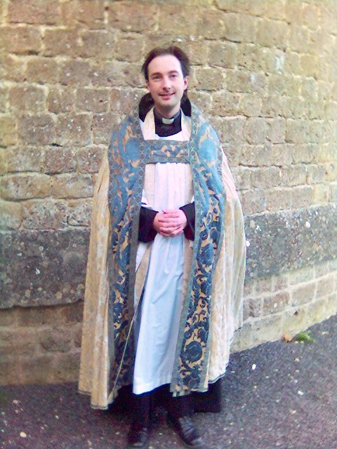 Capa pluvial Picture of an Anglican priest wearing a cope, taken by Gareth Hughes on 21 October 2005.